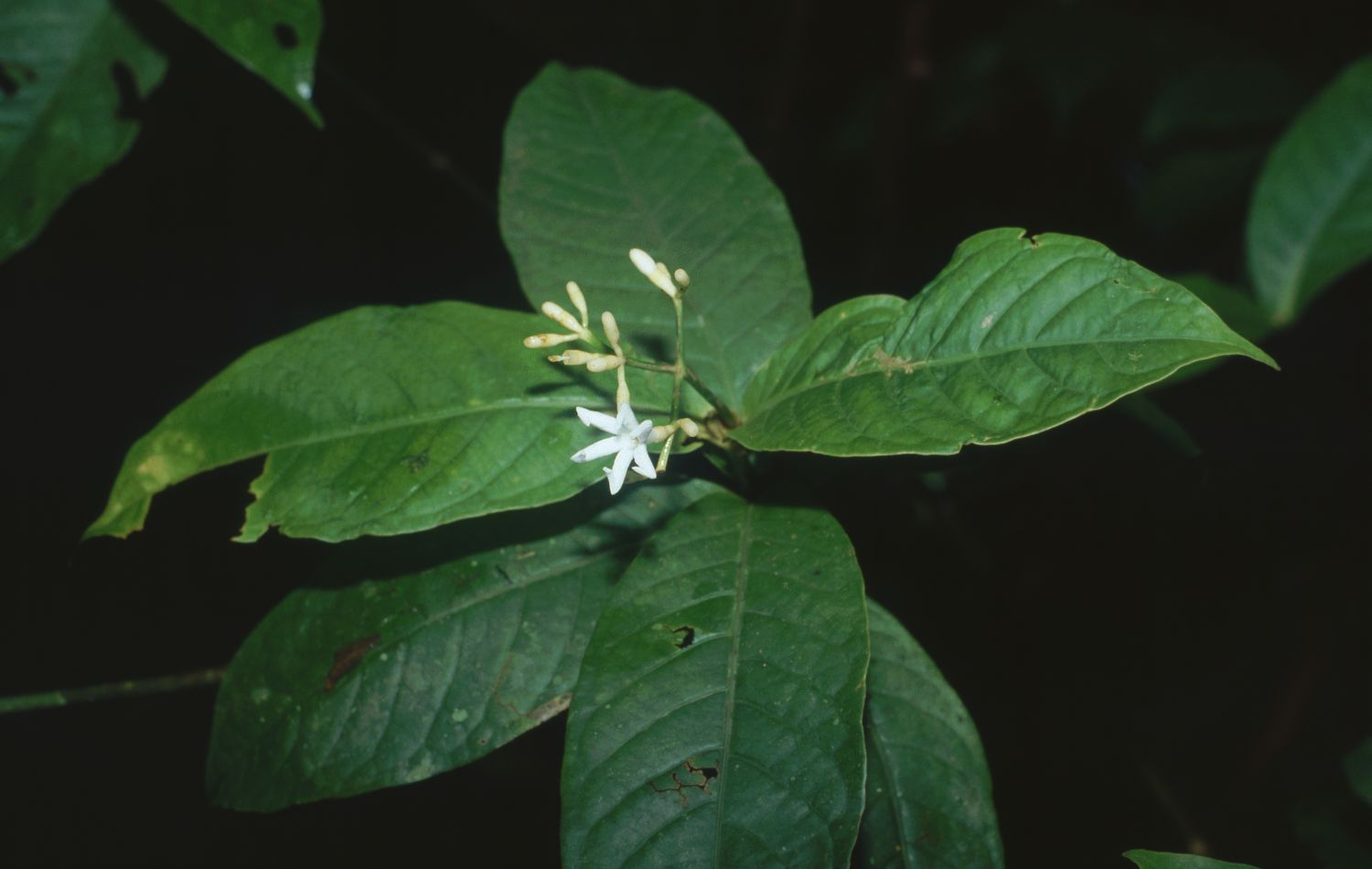 Rudgea skutchii, Kaffeegewächse (Rubiaceae) – Costa Rica: Prov. Puntarenas, PN Piedras Blancas, Bosque Esquinas bei La Gamba, "Ocelot Trail"